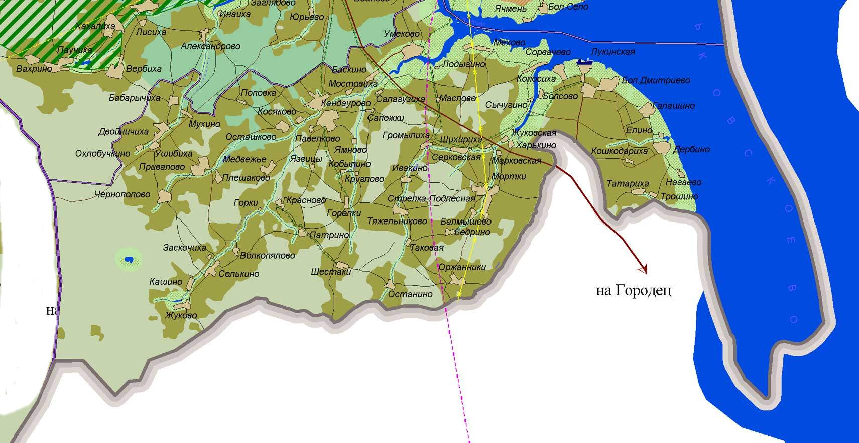 Карта сельского поселения